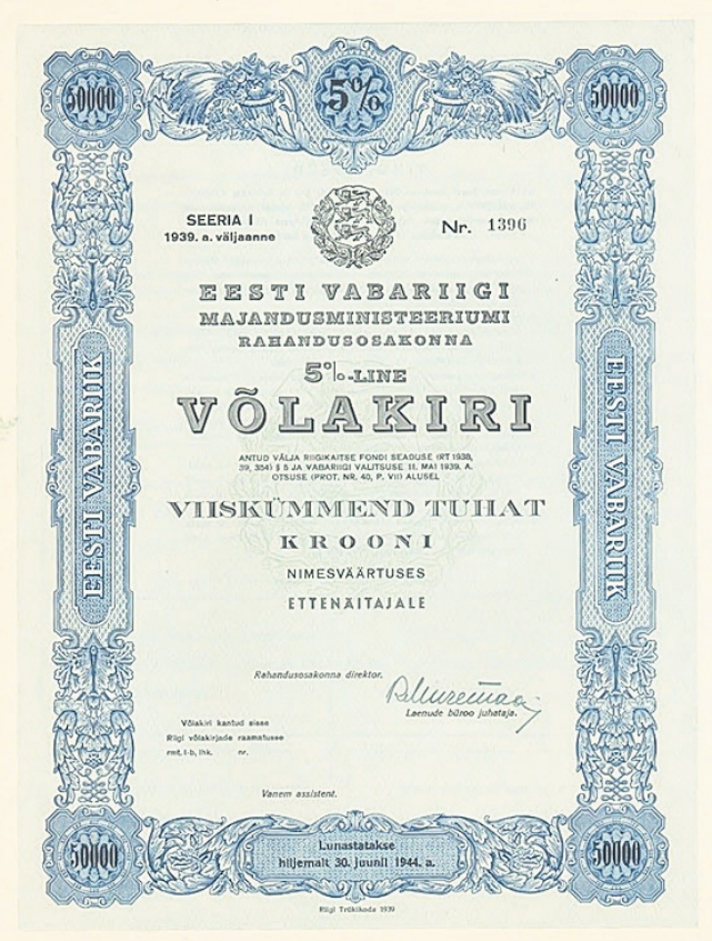 Eesti Vabariigi võlakiri aastast 1939 lunastamistähtajaga hiljemalt 30. juunil 1944